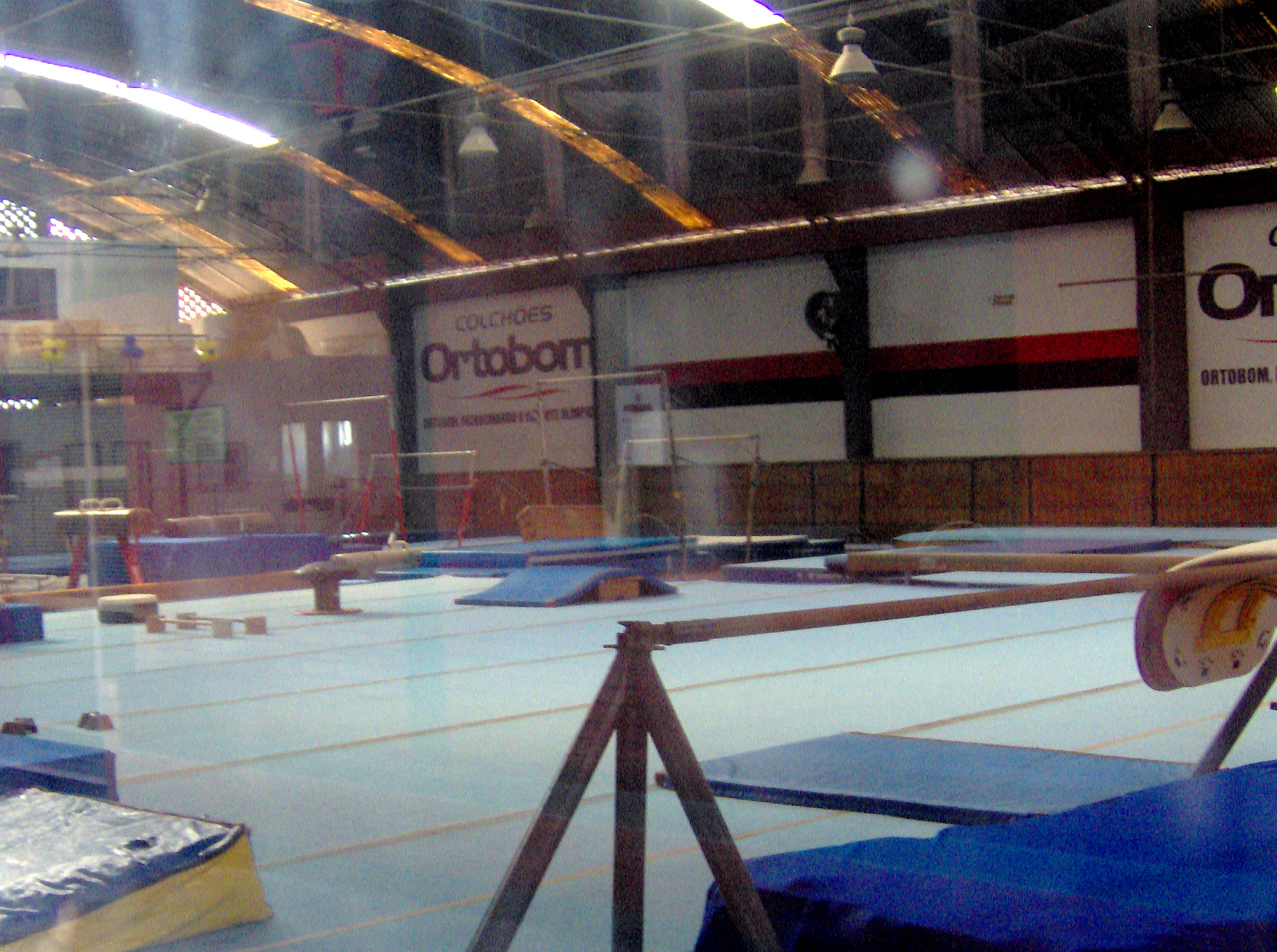 Interior do Ginásio Cláudio Coutinho, do Clube de Regatas do Flamengo, na Gávea, Rio de Janeiro.